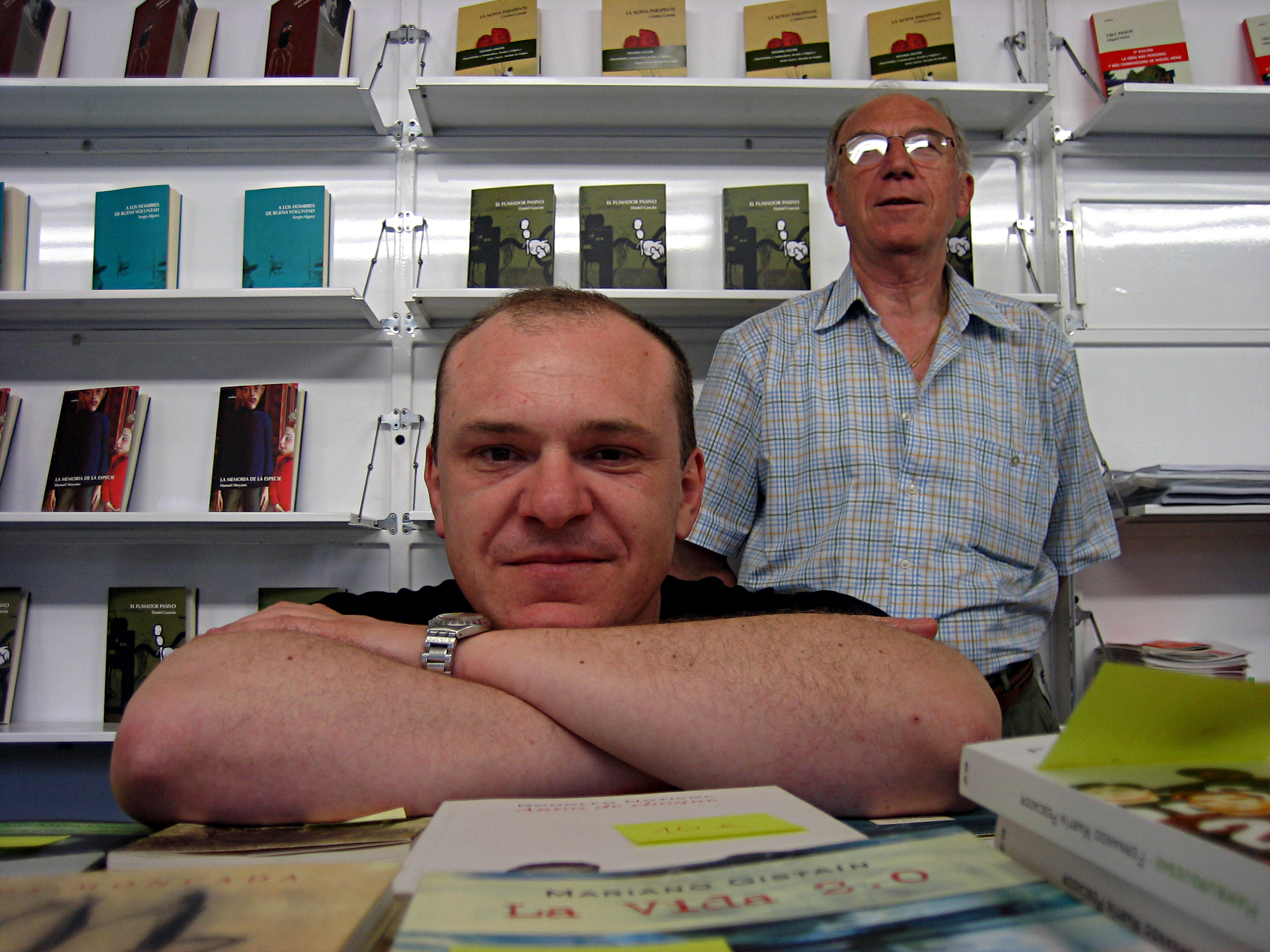 Chusé Raúl Usón en la Feria del Libro de Zaragoza.